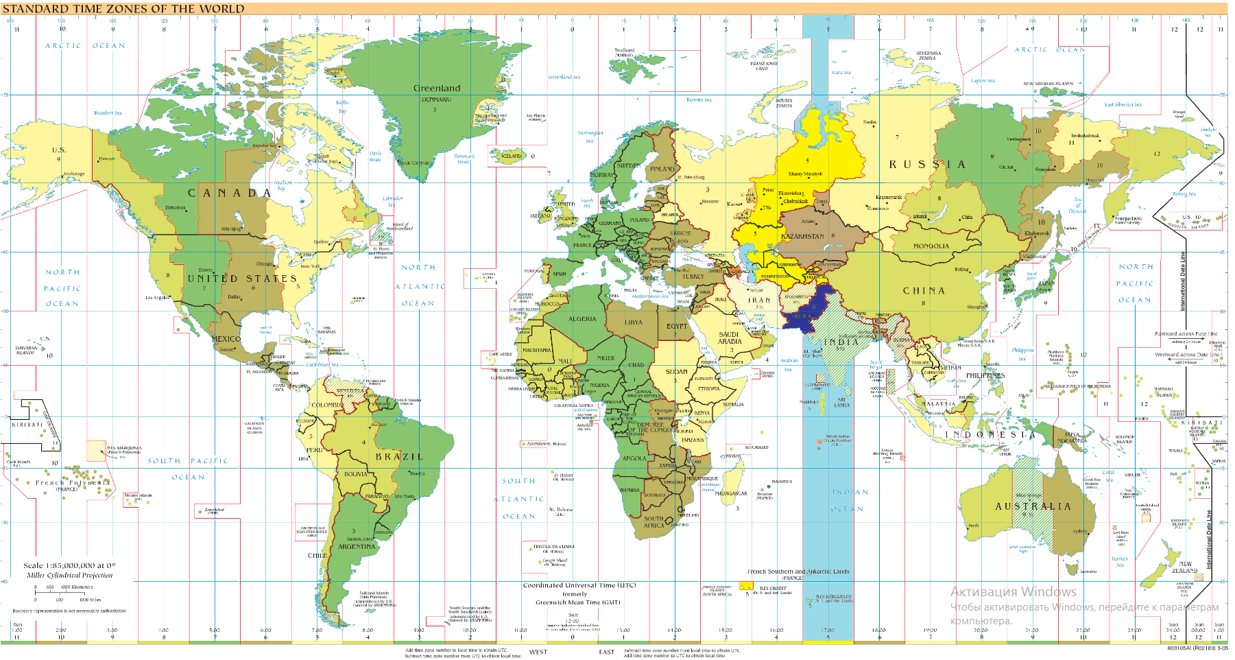 UTC+5 26.10.2014